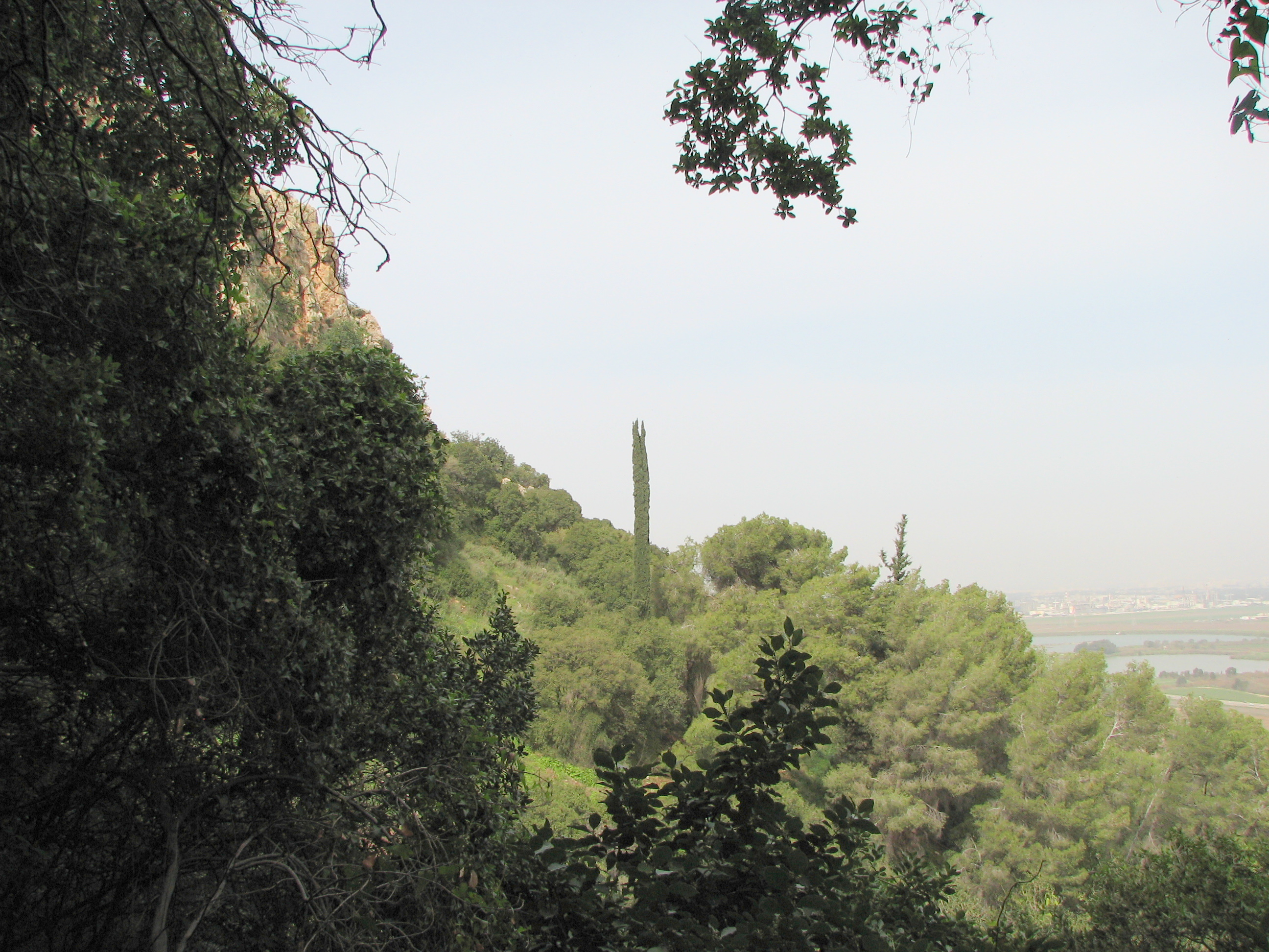 Green Paths, between Nesher - Yagur on Mount Carmel Israel. View from the path השביל הירוק בין העיר נשר וקיבוץ יגור, על הצלע הצפונית של הר הכרמל. מראות על השביל